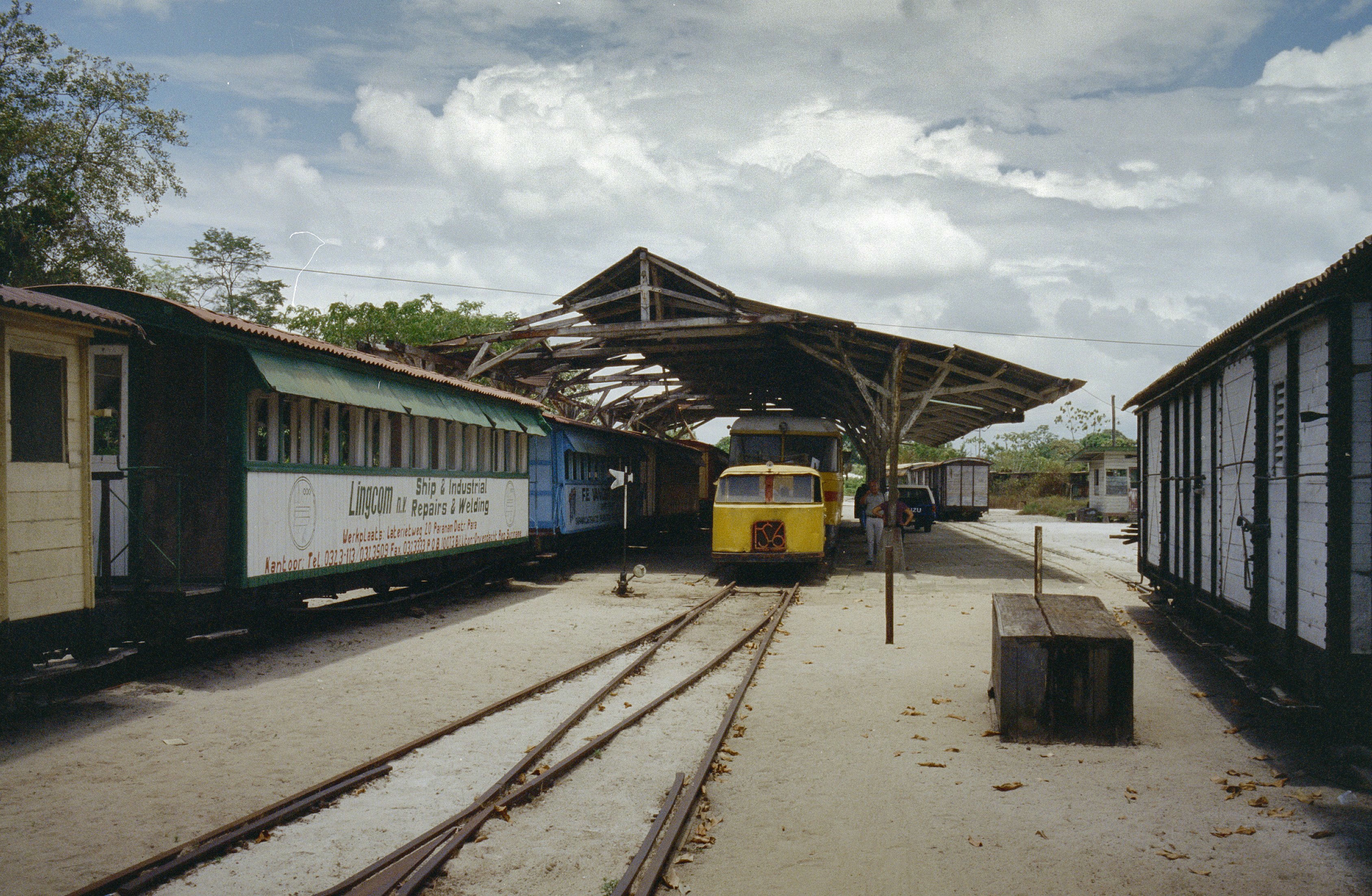 Voormalig station: Overzicht voormalig station (opmerking: Suriname Reis Loek Tangel)